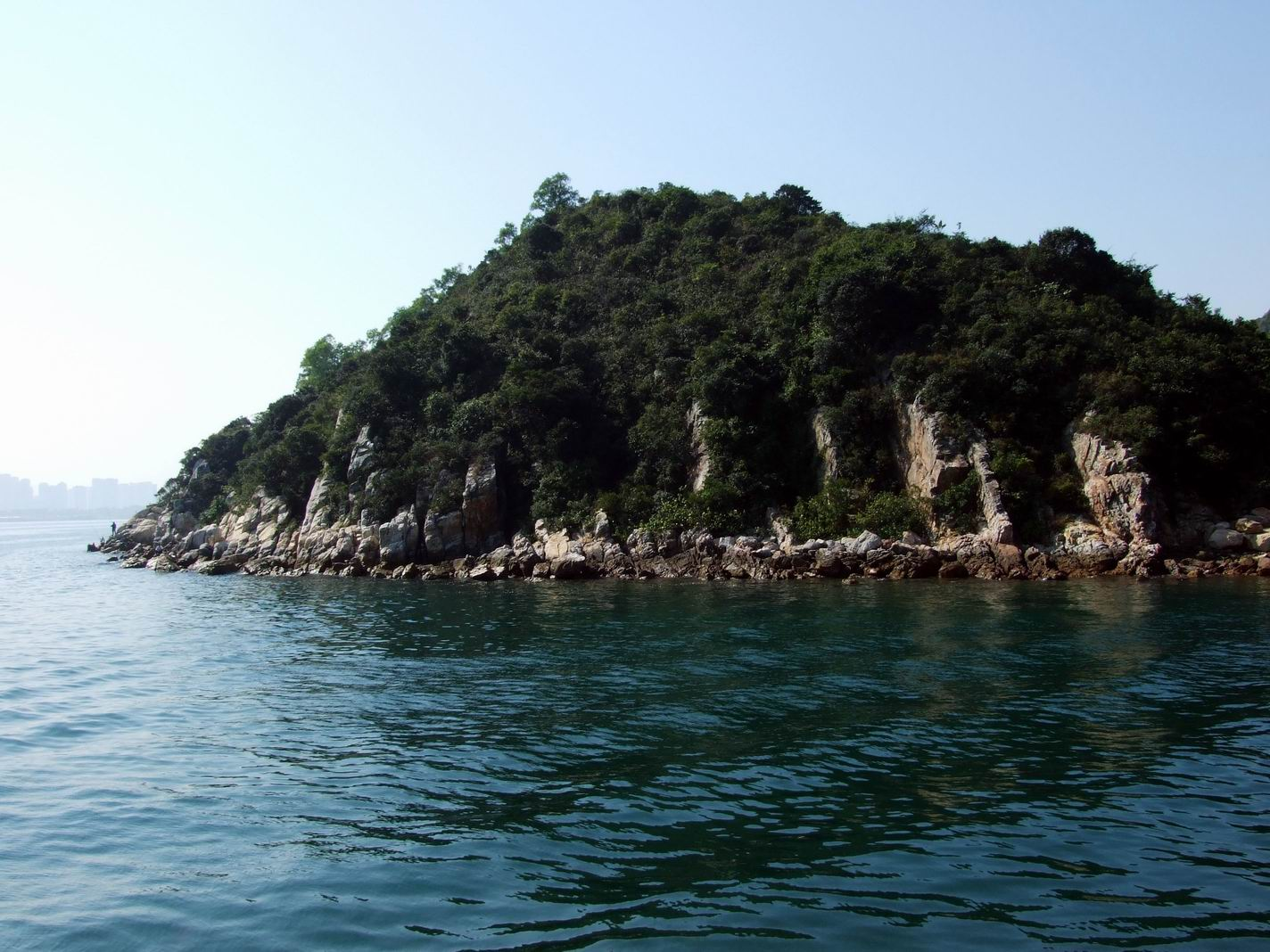 白排角Pak Pai Kok